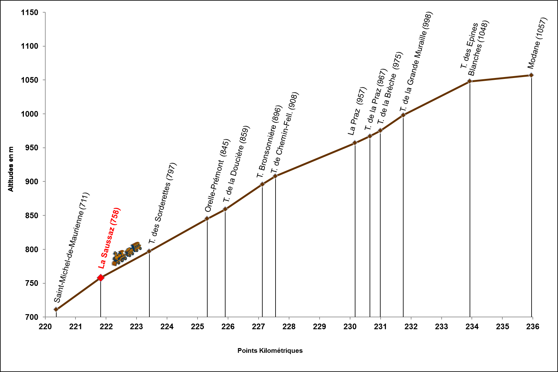 Profil en long de la ligne de la Maurienne entre Saint-Michel-de-Maurienne et Modane (PK 220-236) - Lieu du déraillement du train ML 3874 lors de l'accident de Saint-Michel-de-Maurienne du 12 décembre 1917 / Savoie / France